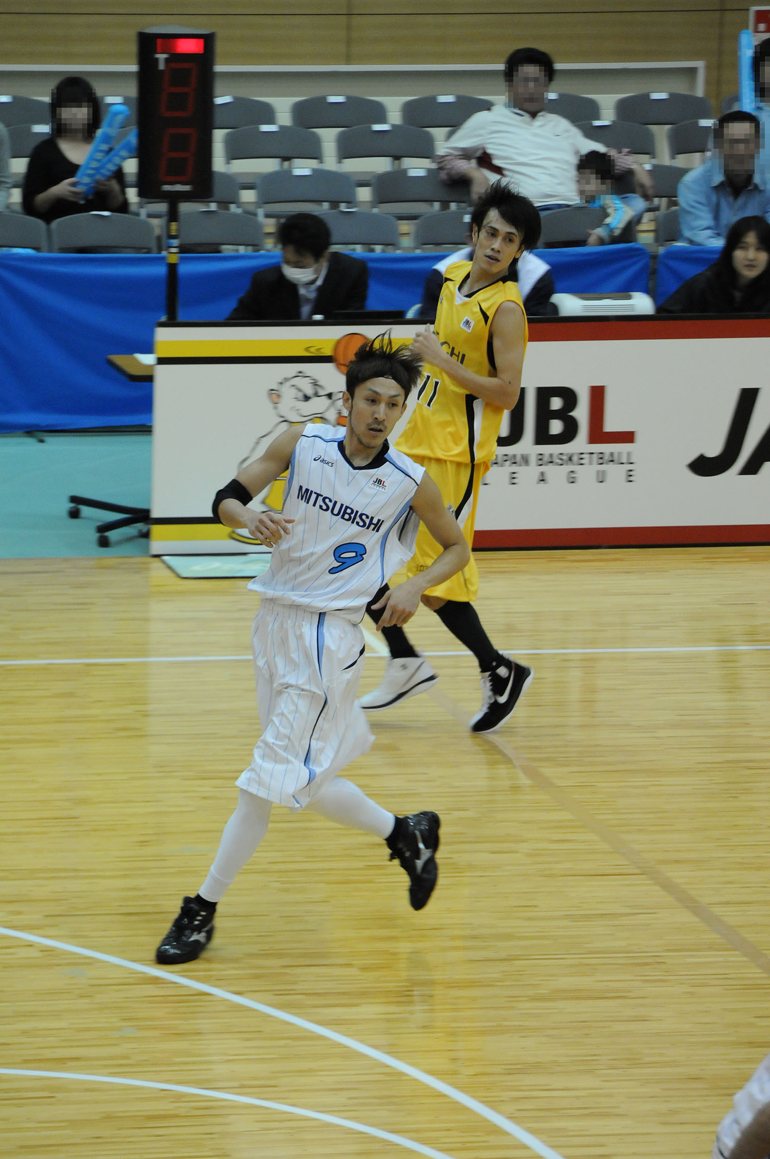 三菱電機ダイヤモンドドルフィンズ、梶山信吾選手。琴丘総合体育館で。